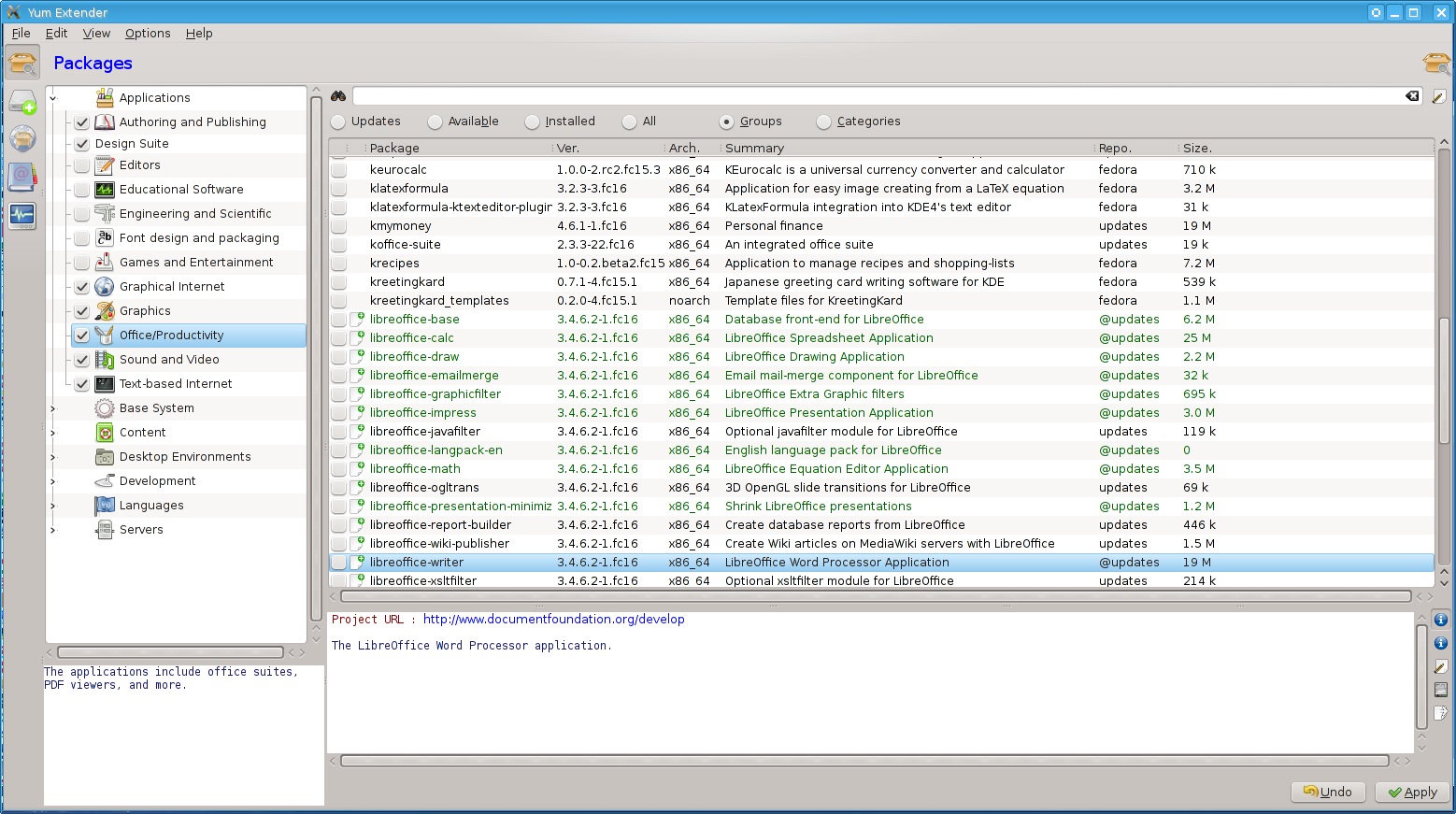 Yum Extender 3.0.6